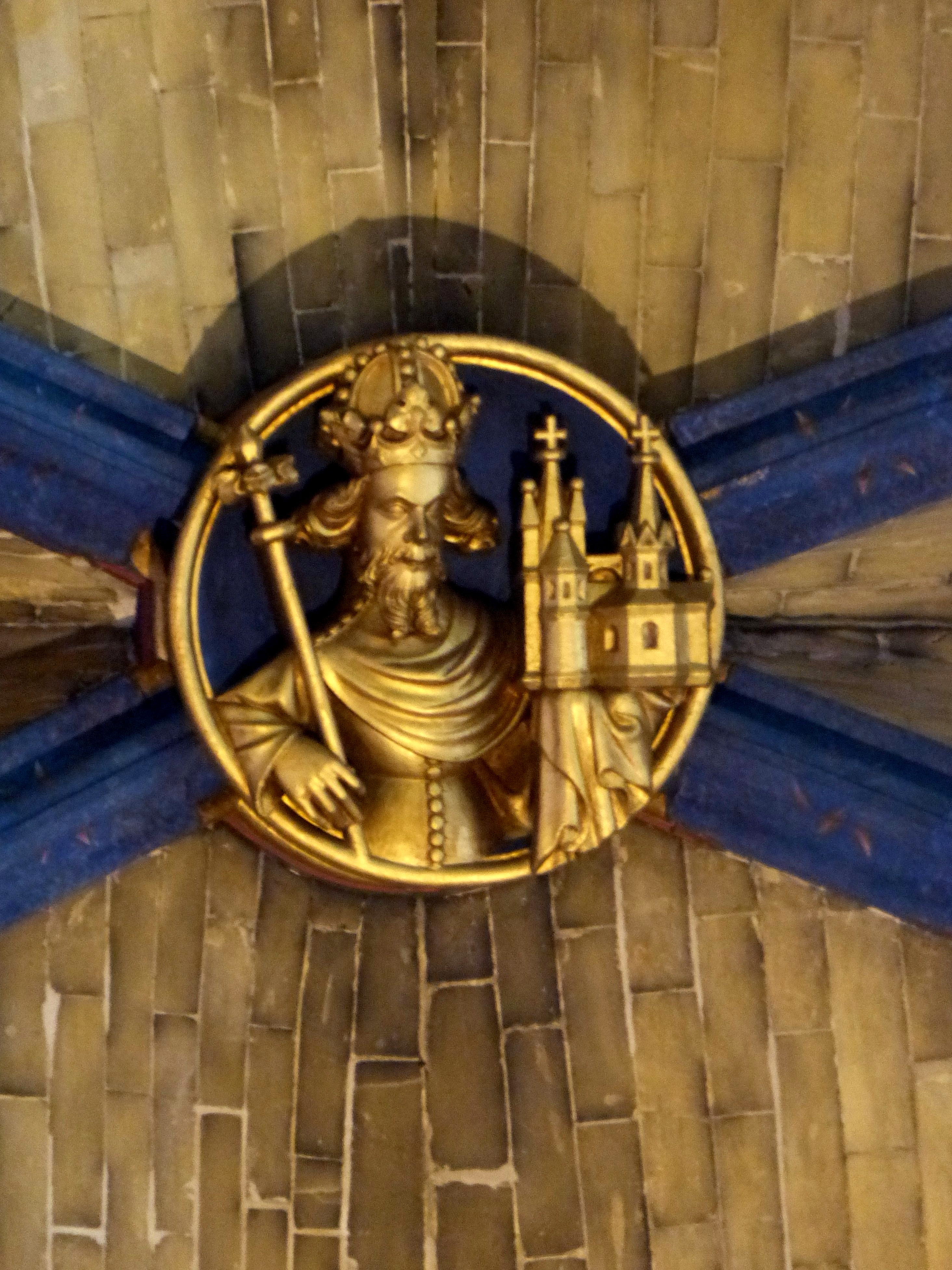 Aachener Dom: Gotische Chorhalle, Blick auf den Gewölbeschlussstein (Karl der Große)